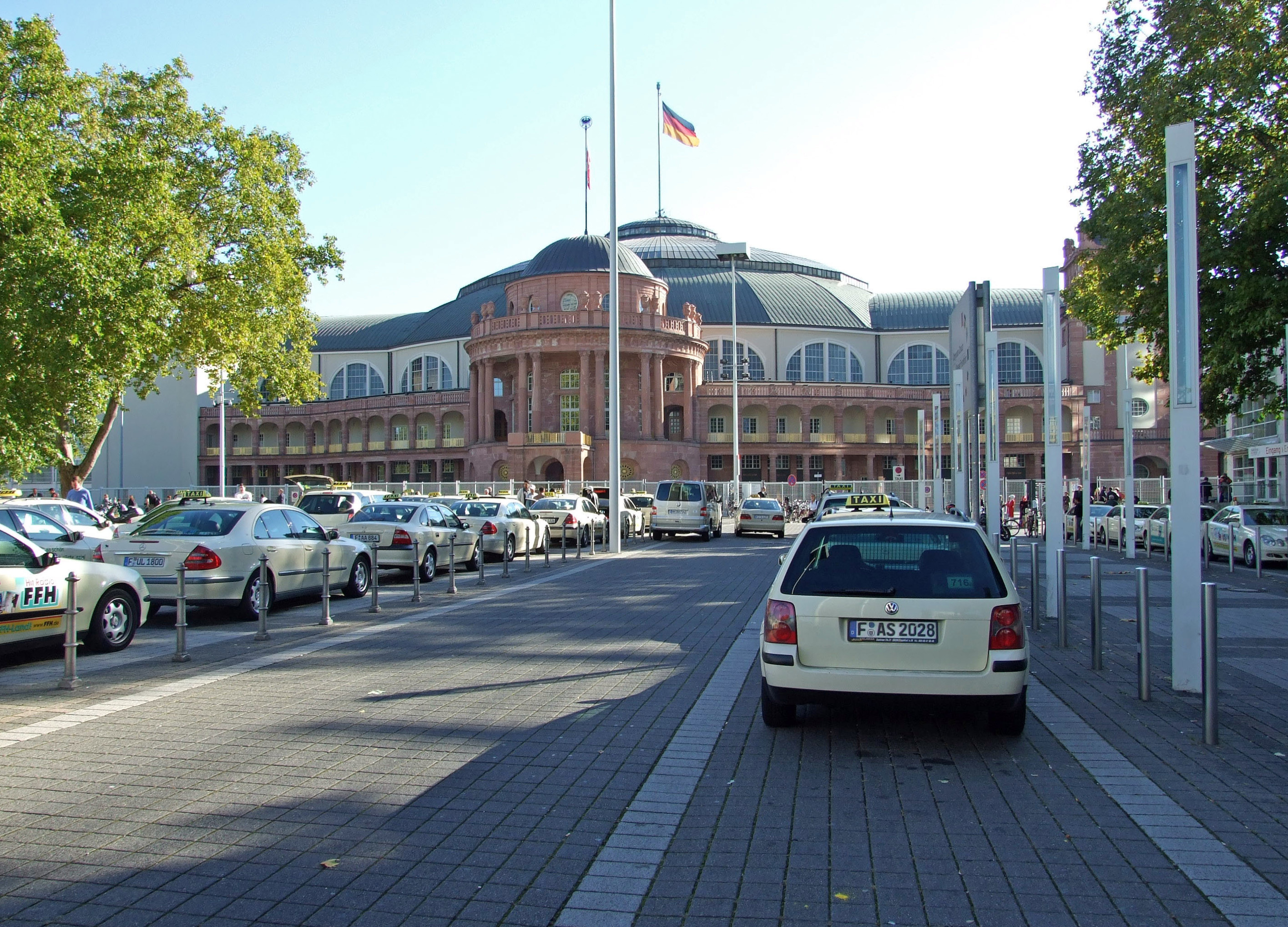 Die Festhalle auf dem Messegelände in Ffm